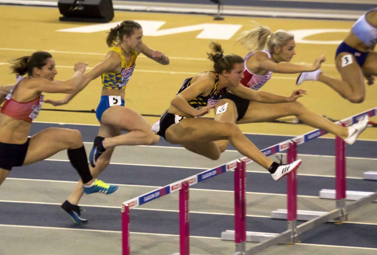 EKI10009 maudens 60mH